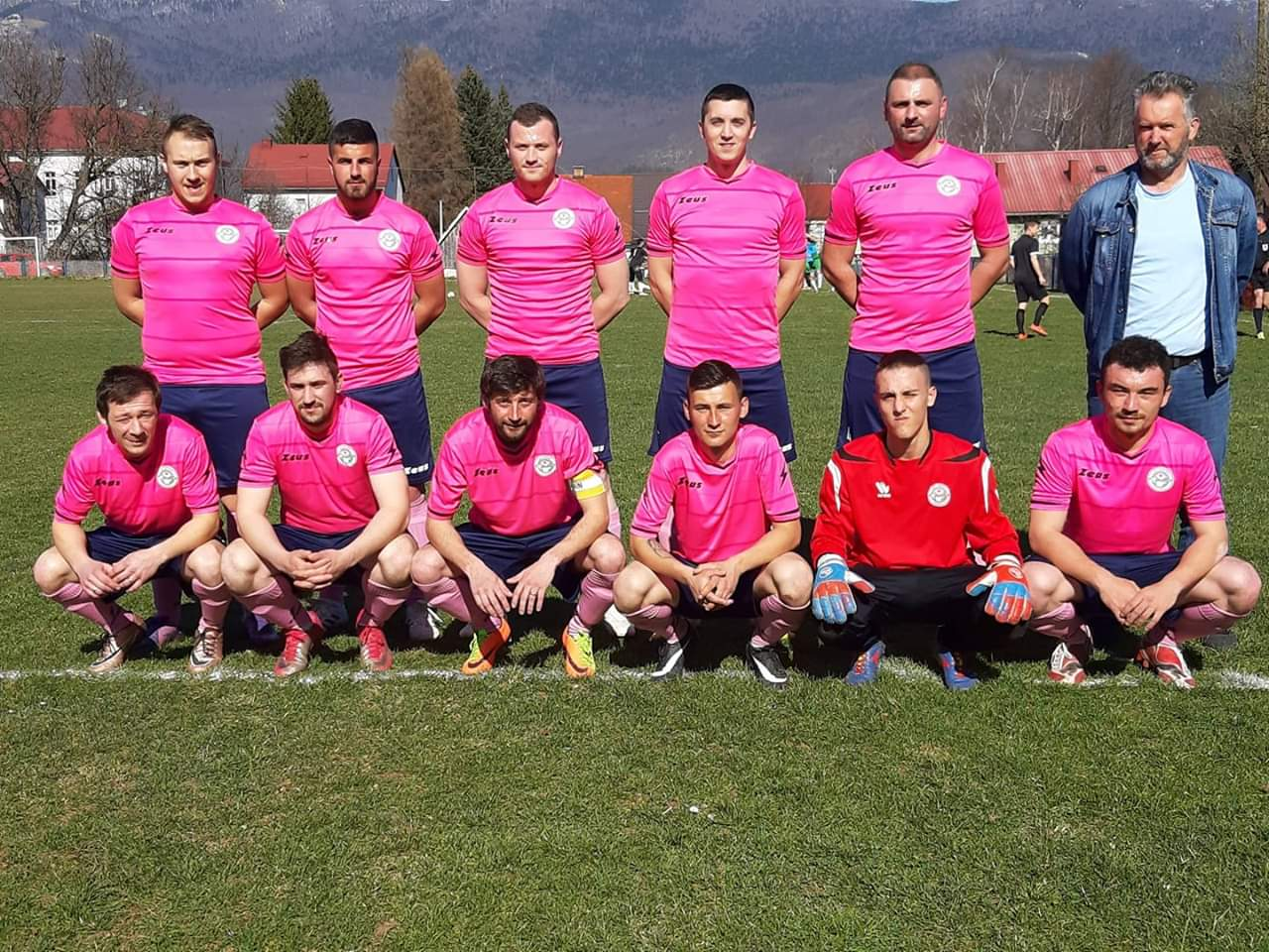 Nogometaši NK "Lika 95" u ružičastima dresovima.